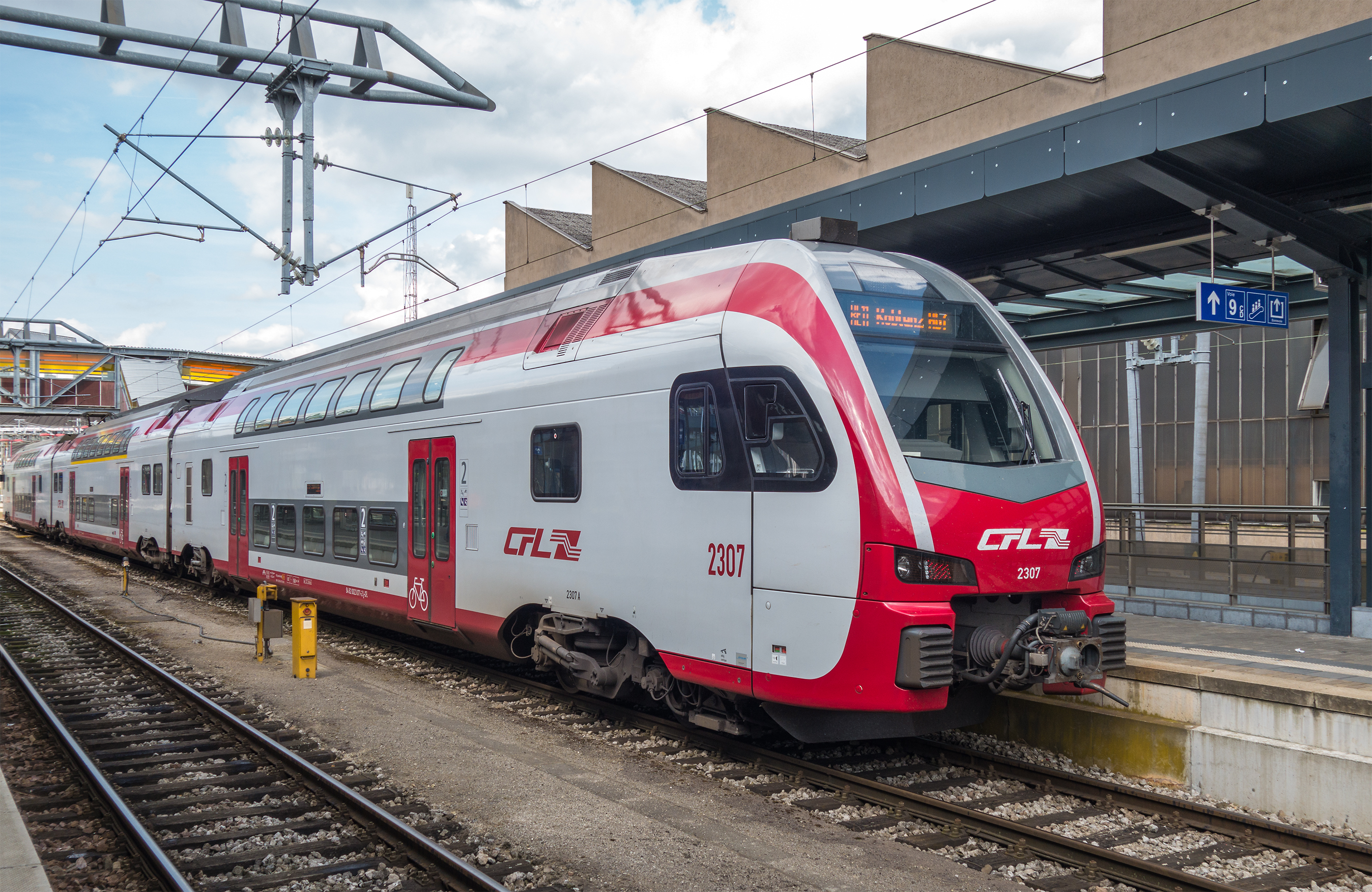 Den CFL 2307 an der Gare vu Lëtzebuerg